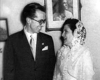 Xosé Neira Vilas e Anisia Miranda Fernández no día do seu casamento